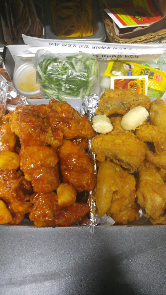 치킨이미지